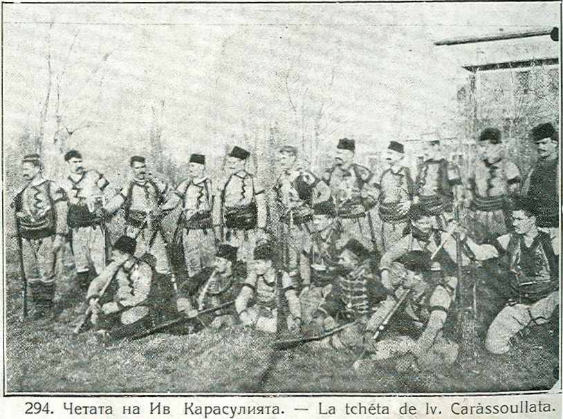 Четата на Иванчо Карасулията.